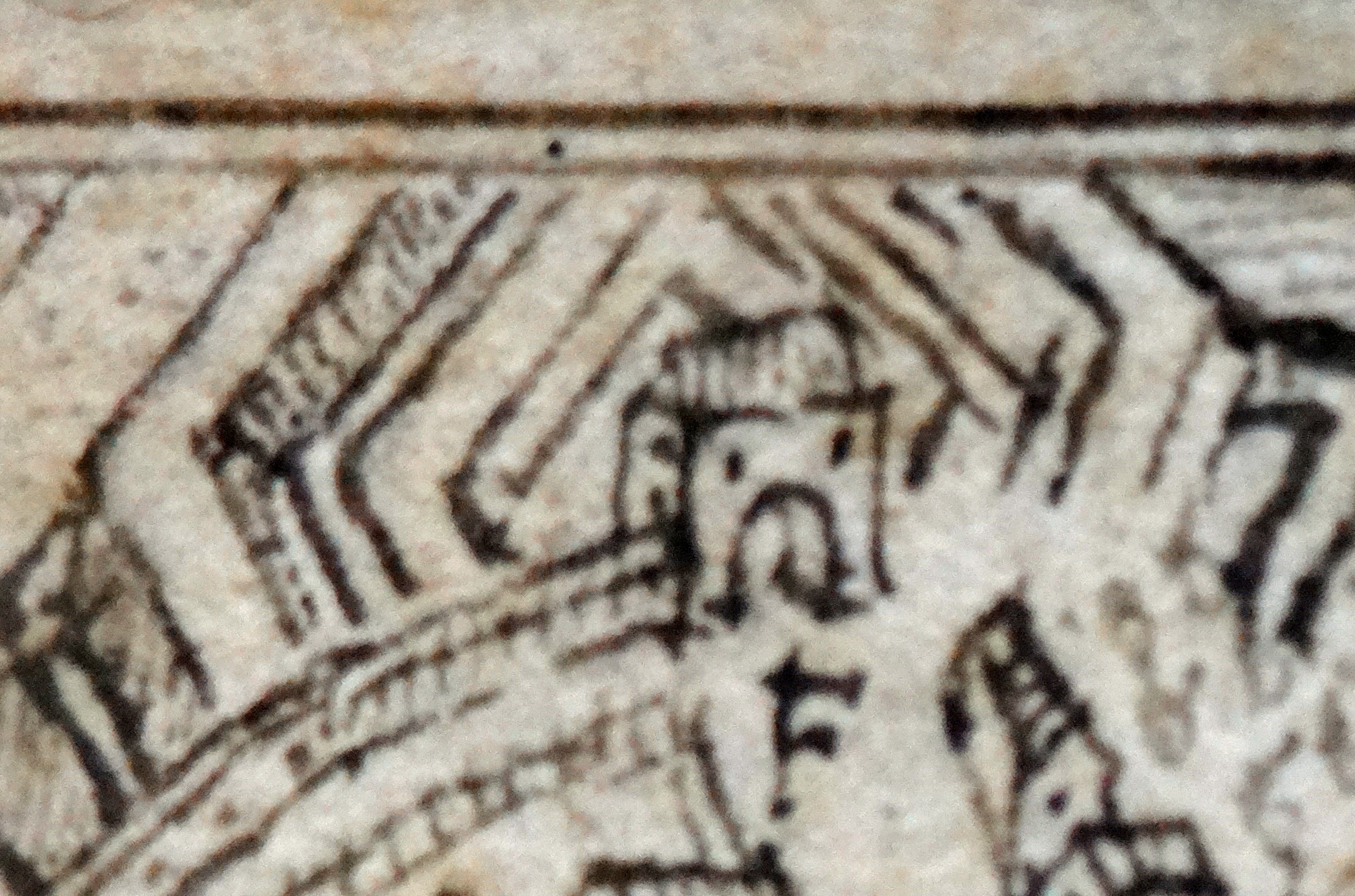 Michaelstor in der äußeren Stadtmauer von Worms. Detail aus: Peter Hamann: Statt Wormbß wie selbige 1631 vor dem Schwedischen Ruin der Vorstätt [...] verblieben. Stadtarchiv Worms, Abt. 1B, Nr. 48.